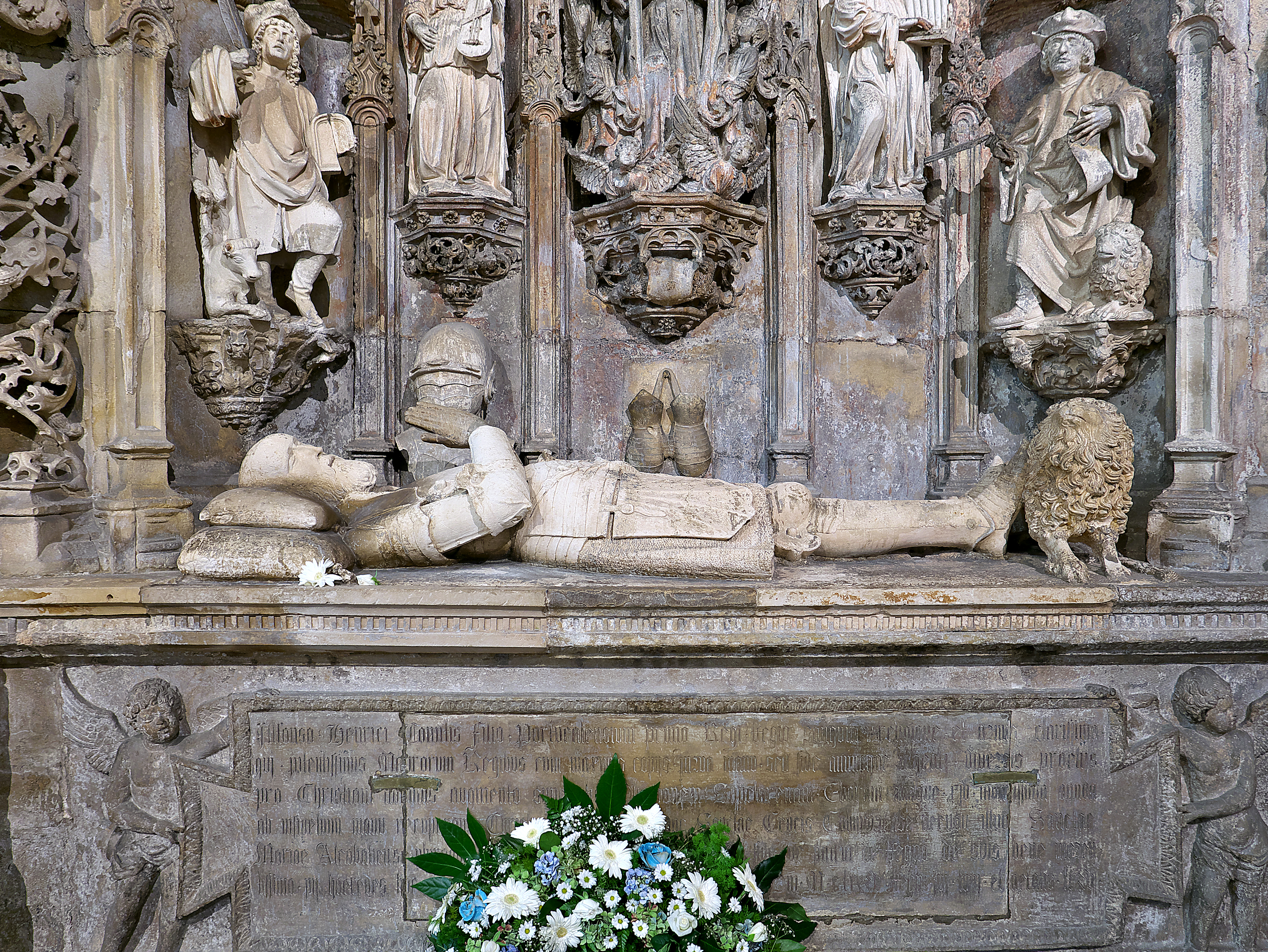 Monasterio de Santa Cruz (Coimbra). Nicolau Chanterene esculpe (1518-1522) la sepultura del primer rey de Portugal.